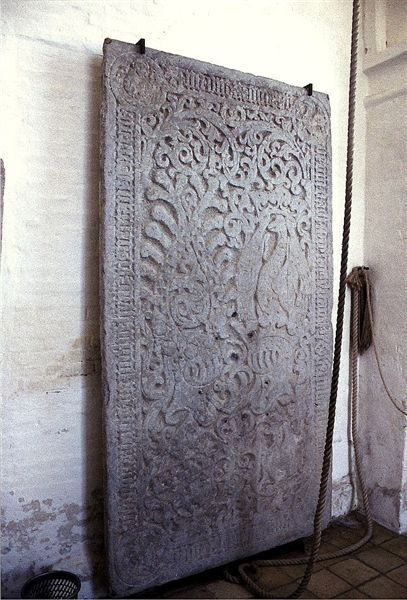 Hornslet Kirke i Danmark. Gravsten i tårnrummet over Otte Rosenkrantz og Margrethe Ganz